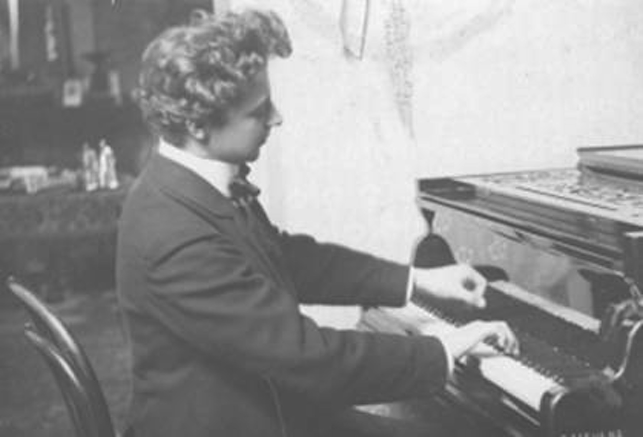 André Devaere aan de piano thuis